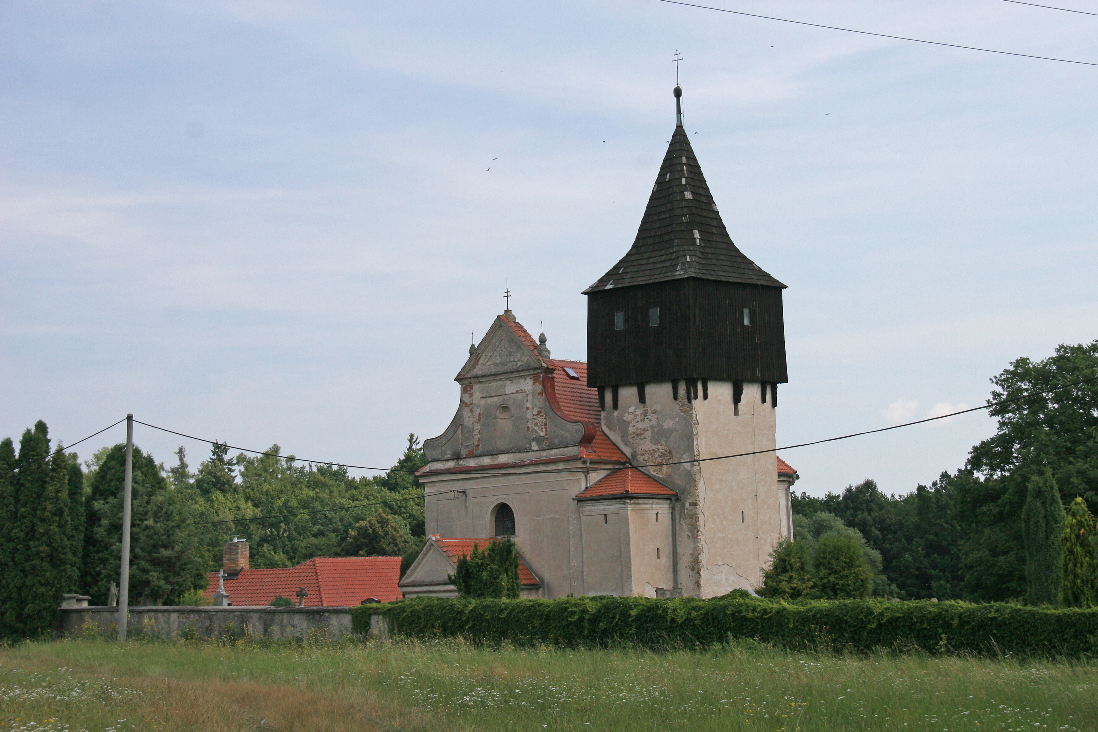 Kostel svatého Ondřeje na Sionu, severně od silnice, Chlístovice.